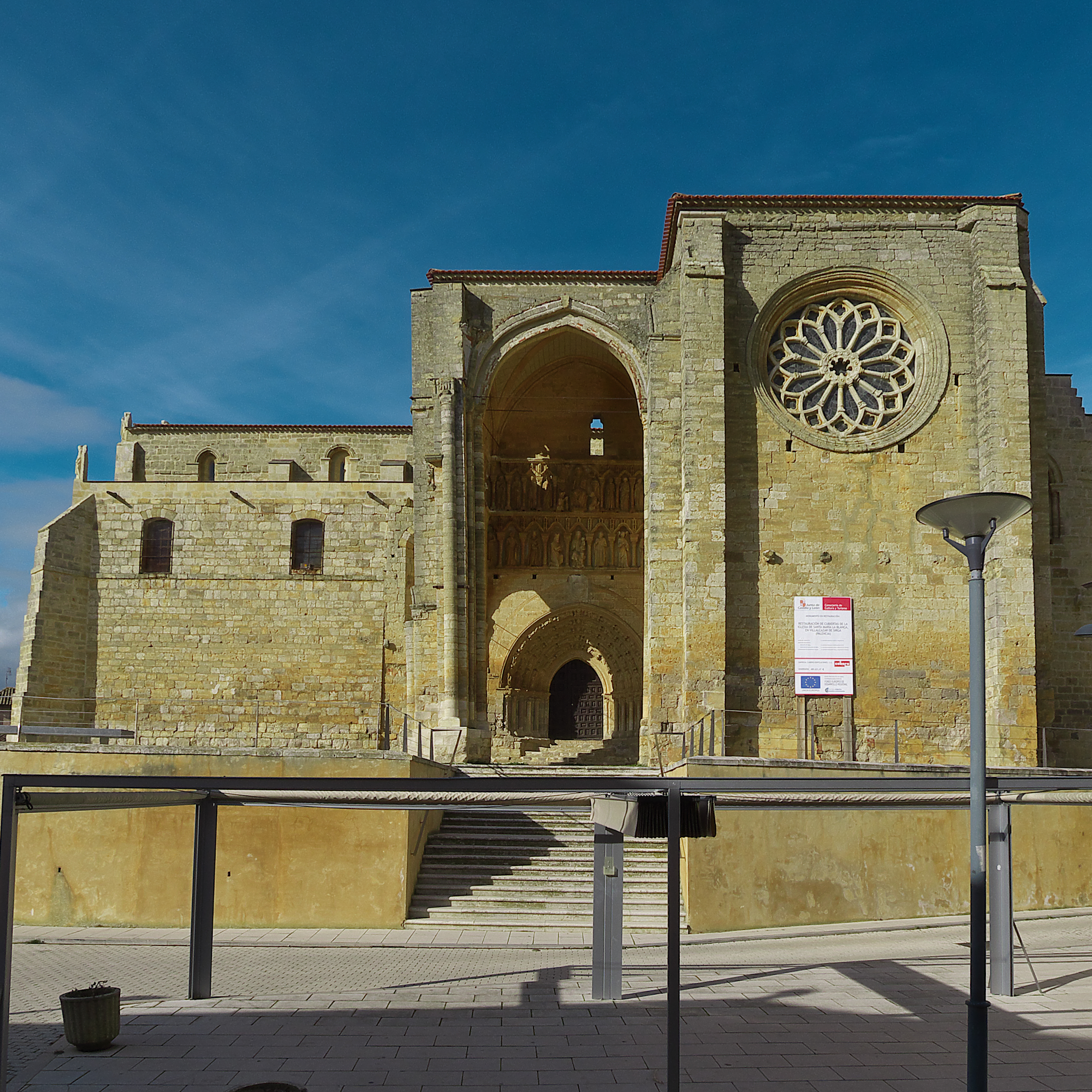 Fachada meridional de la iglesia